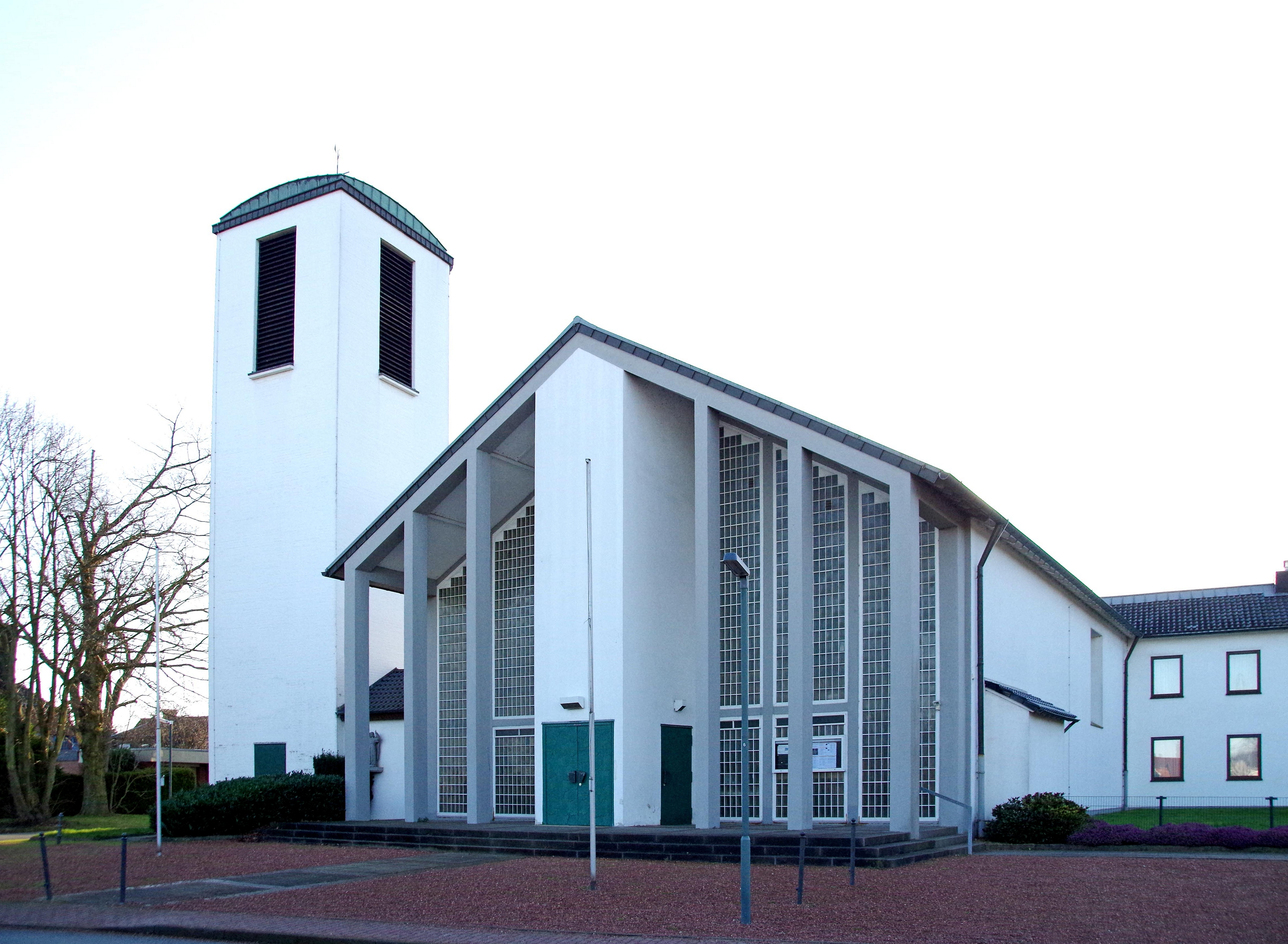 St. Michael (Begau), Nordostseite mit Turm und Eingangsportal